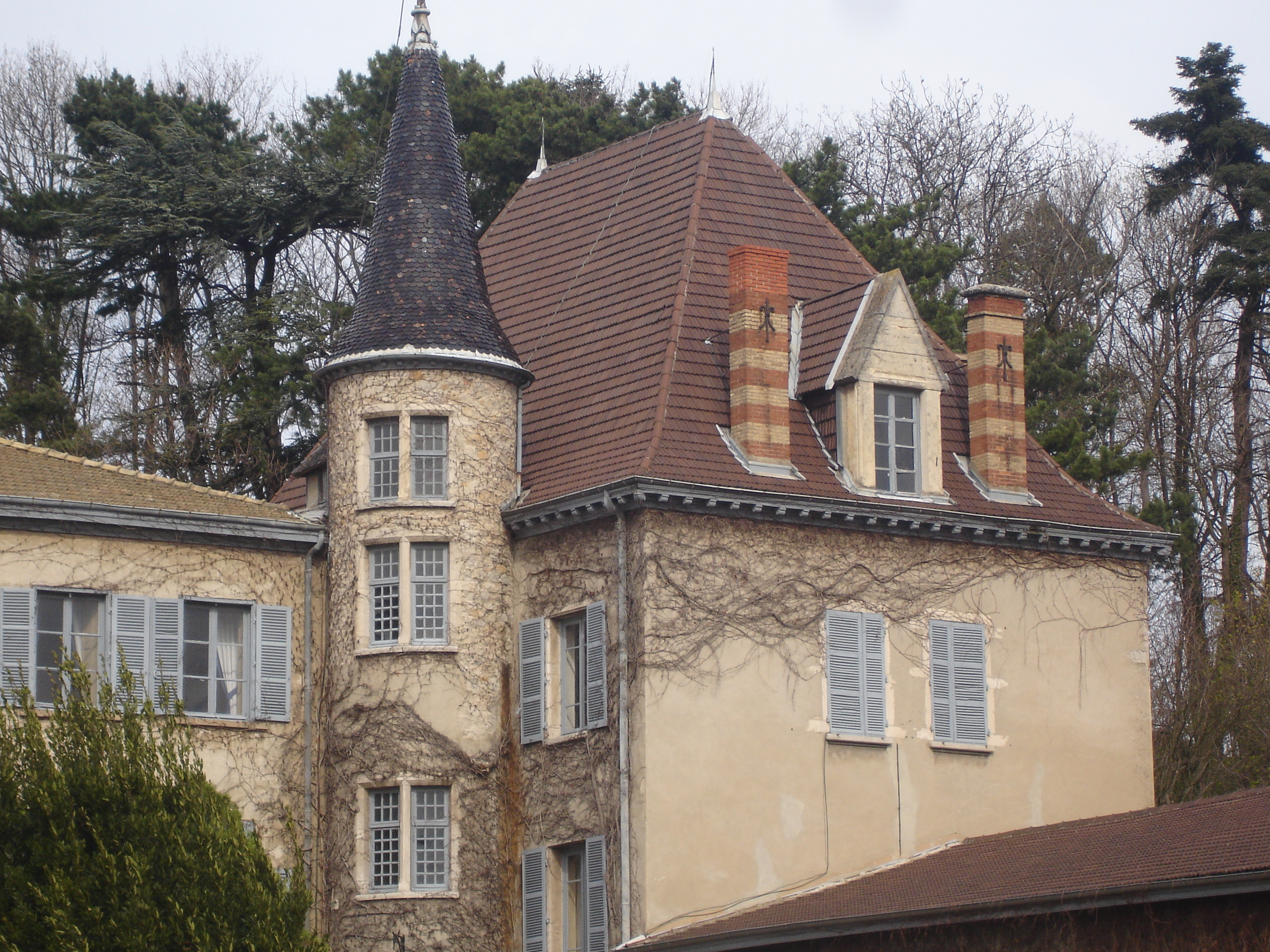 Irigny (69) : Château de La Combe